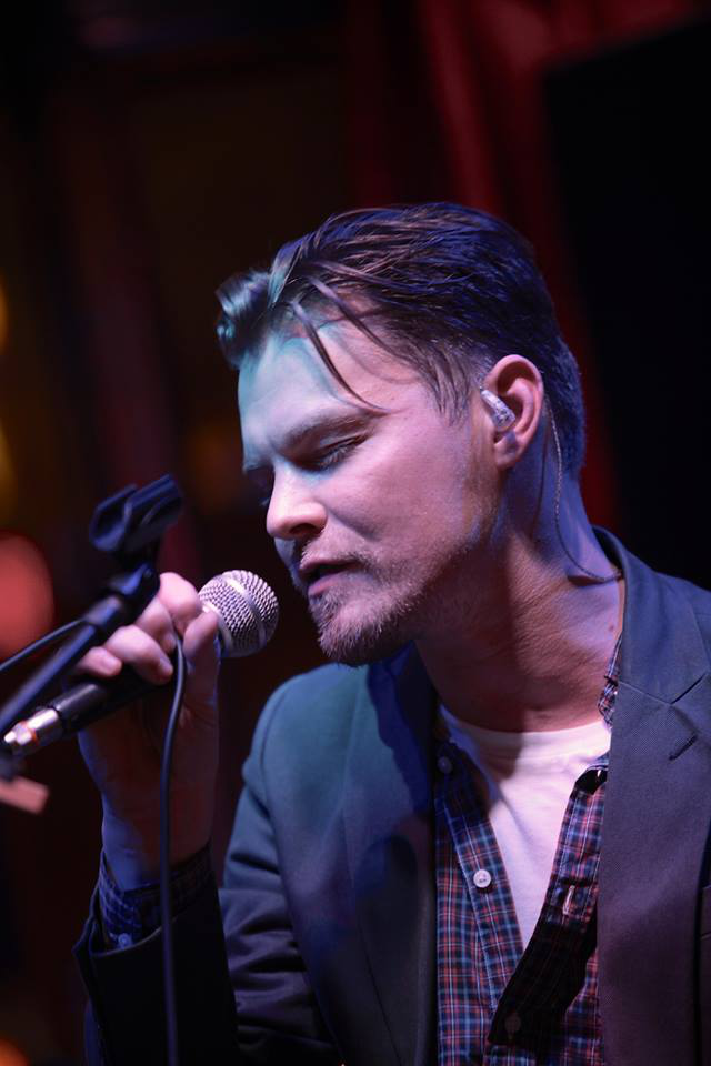 Ланской, Дмитрий Алексеевич